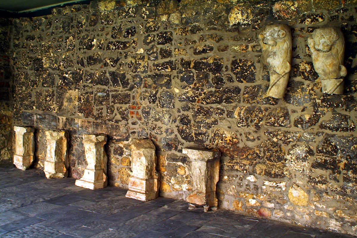 Sieben erhaltene Stücke des Brunnens Piepenborn an der Stadtmauer im Innenhof des Historischen Museums Hannover ...